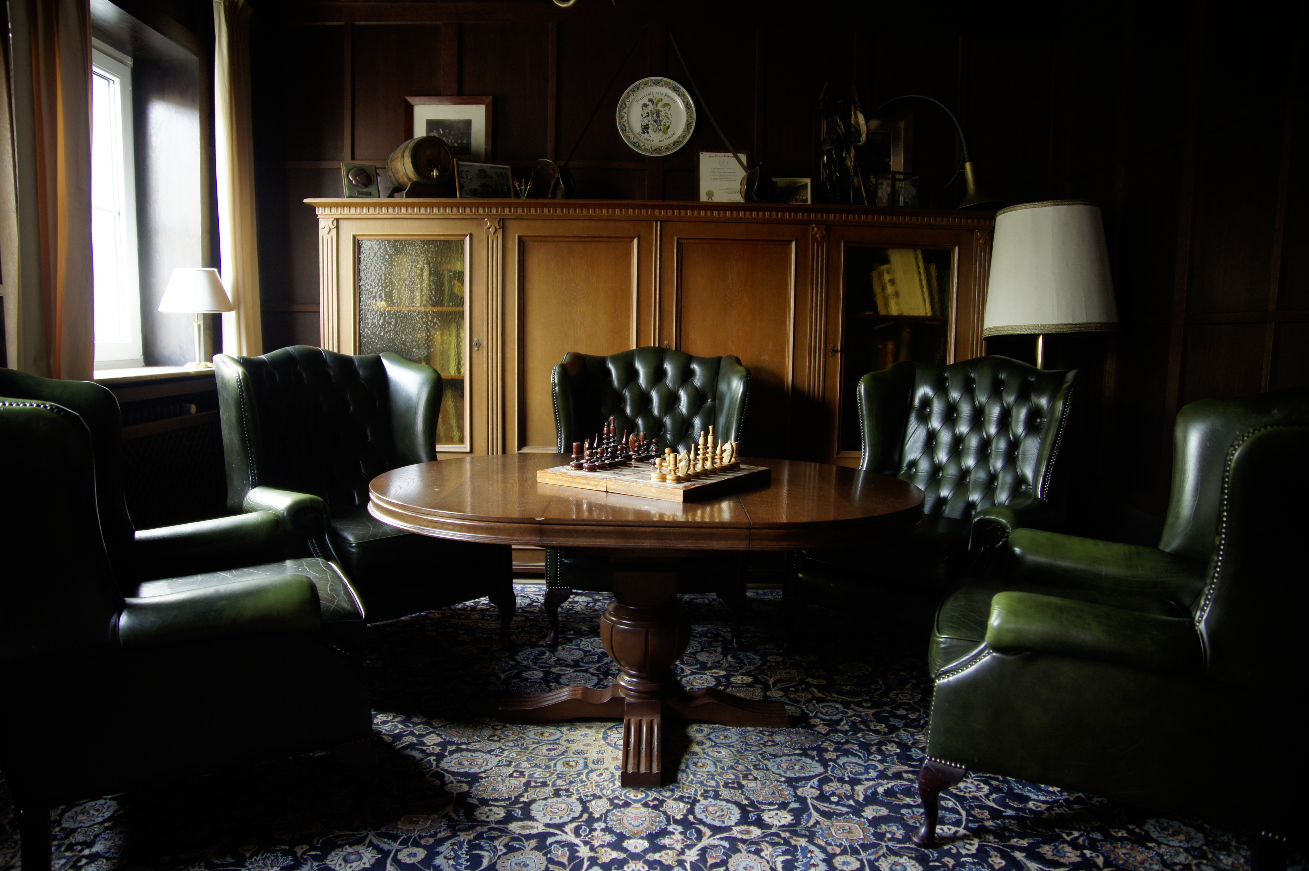 Innenansicht des Opelzimmers des Corps Franconia Darmstadt